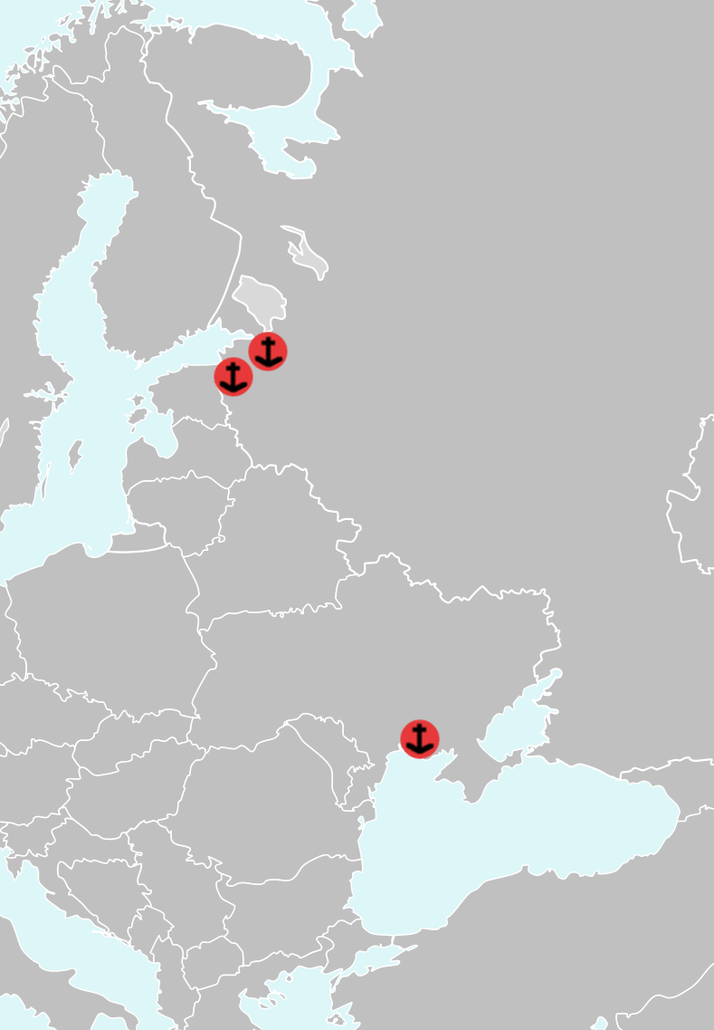 Некоторые из крупнейших портов европейской части СНГ: слева на право: Усть-Луга, Санкт-Петербург (Россия), Ильичевск (Украина)